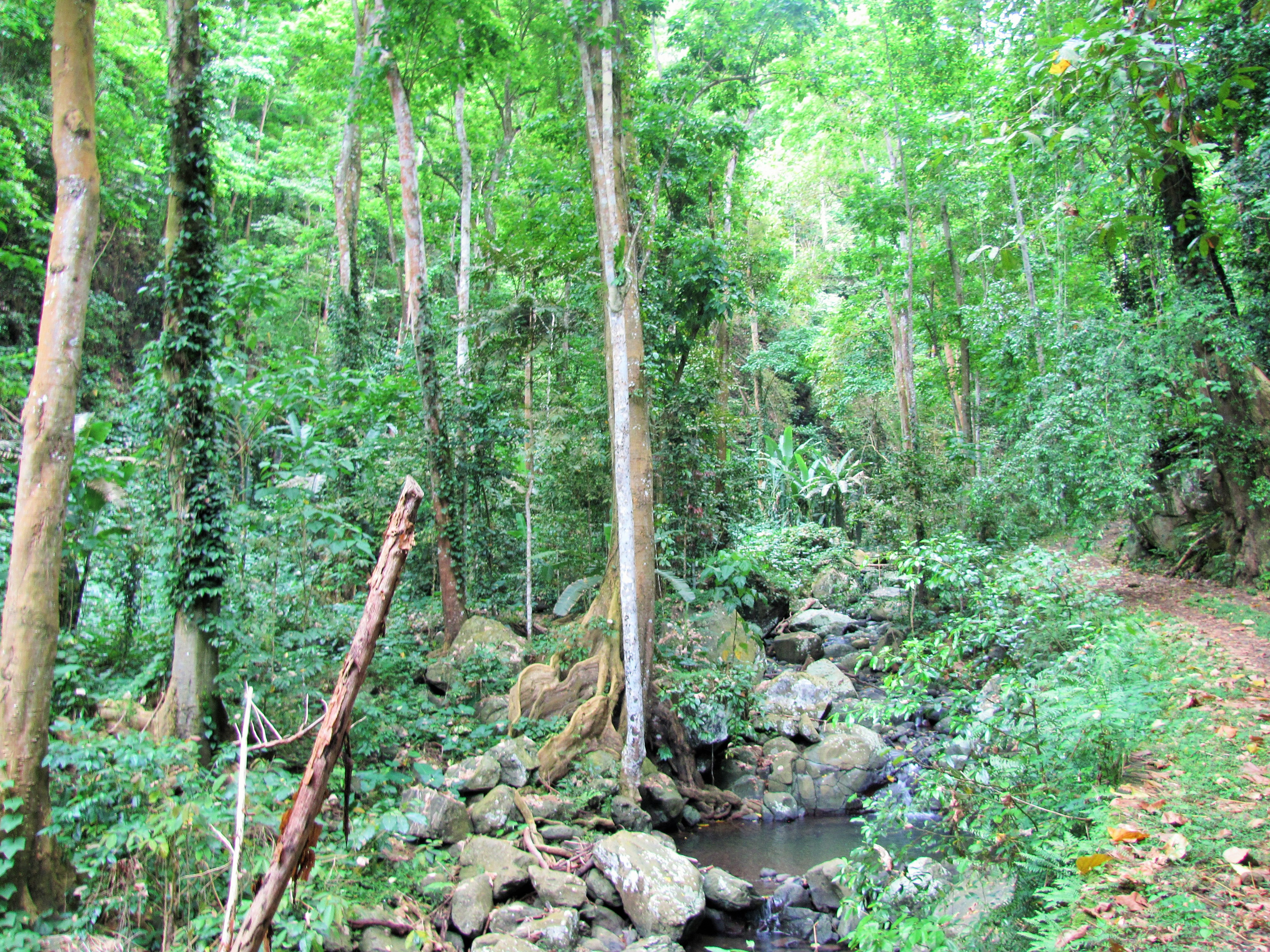 Sao Tome Ponta Figo Hike 8